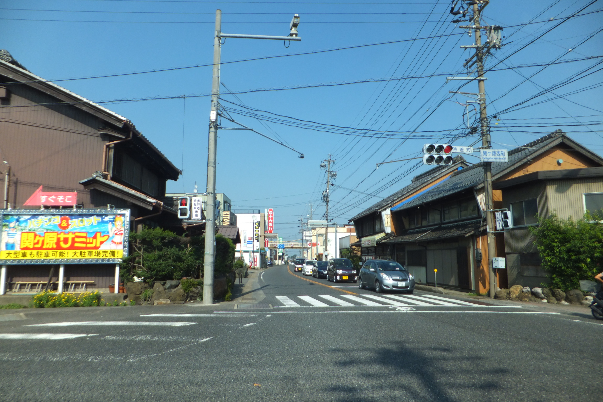 岐阜県不破郡関ケ原町関ヶ原 国道21号